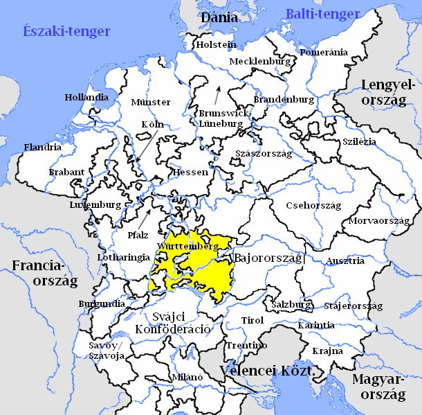 A Sváb körzet térképe a Német-római Birodalomban